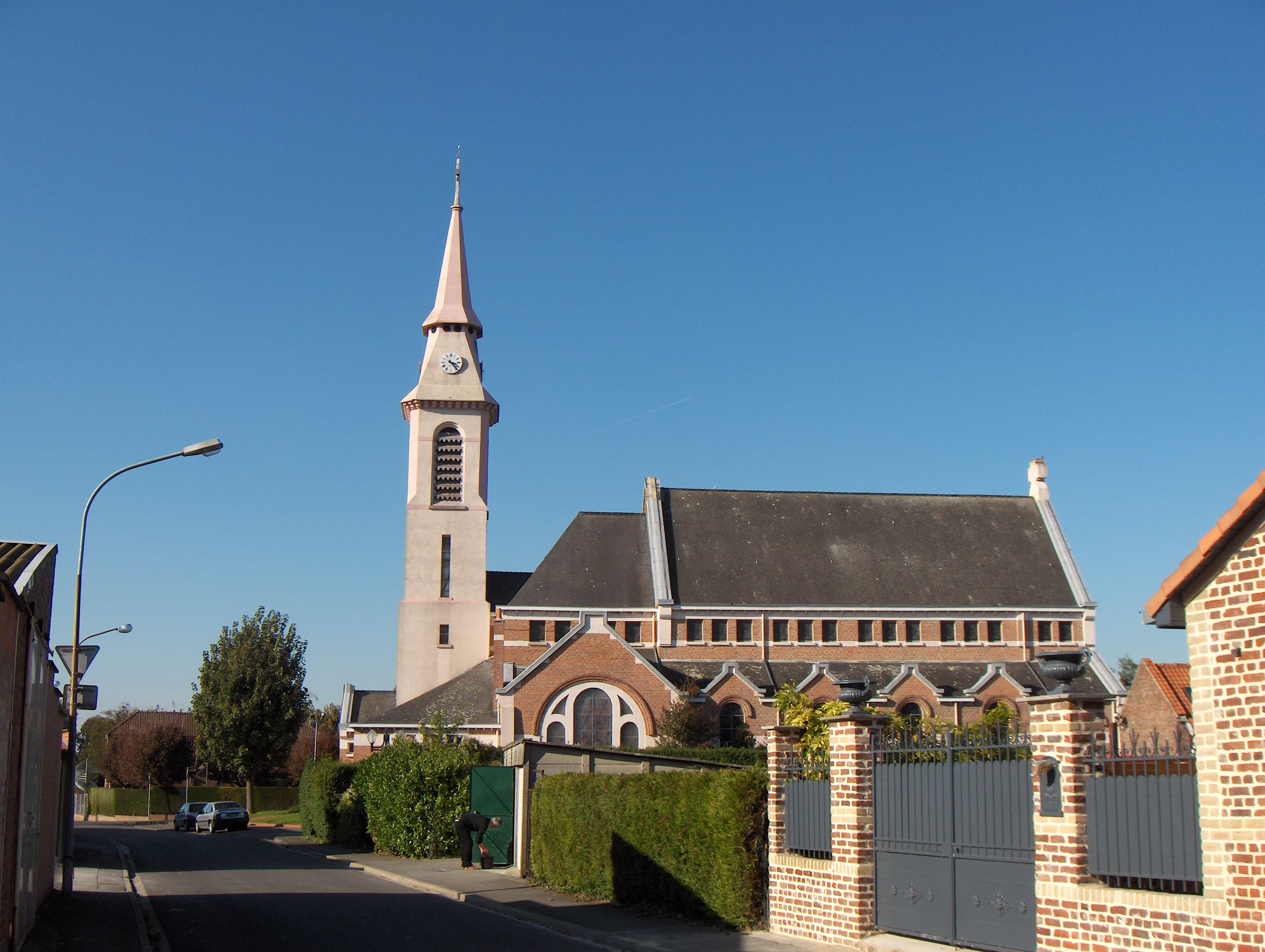 Prémesques (France, dept. Nord), centre du village, église saint-Laurent (années '20)